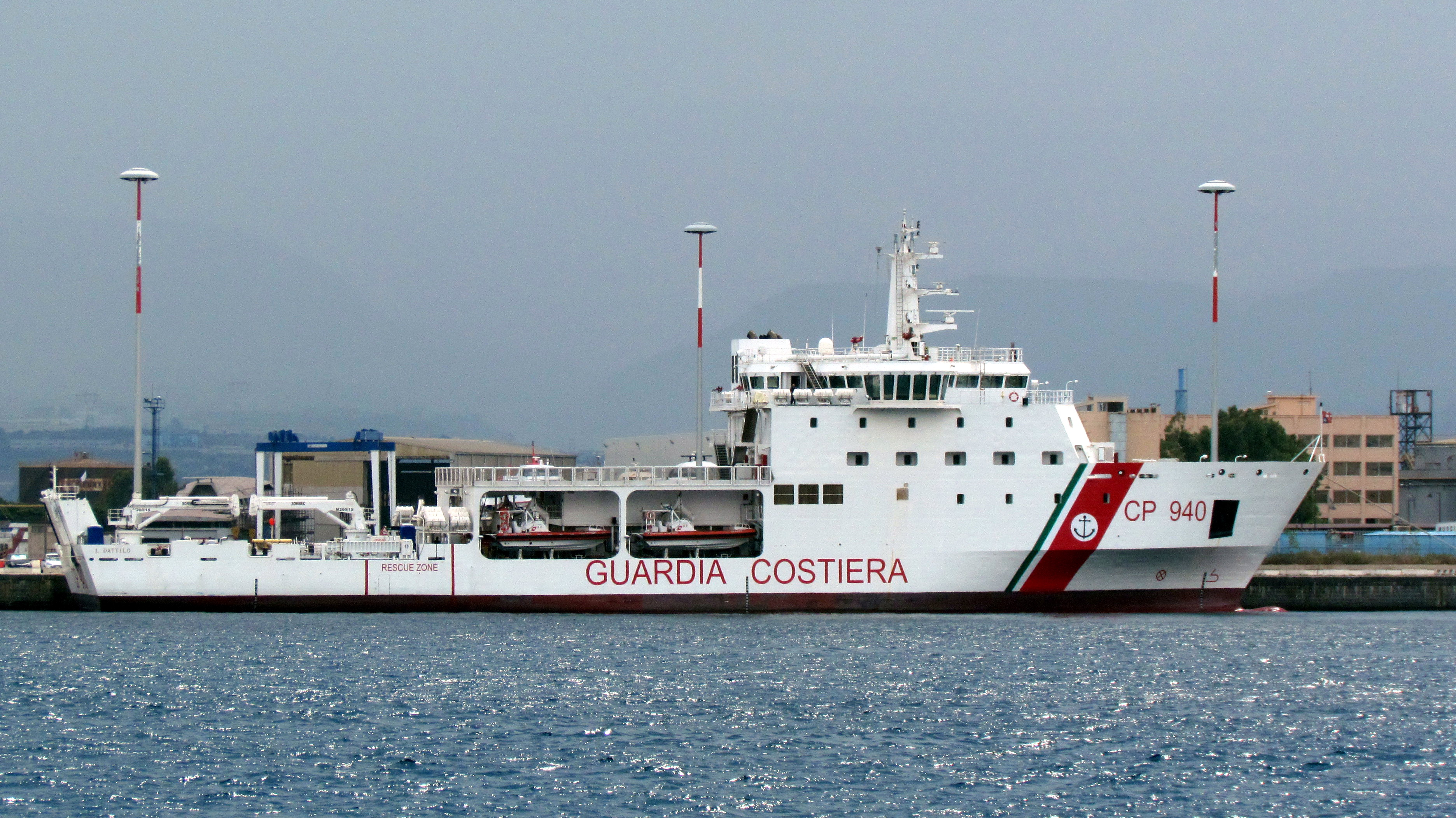 Il pattugliatore della Guardia Costiera Dattilo ormeggiato a Messina